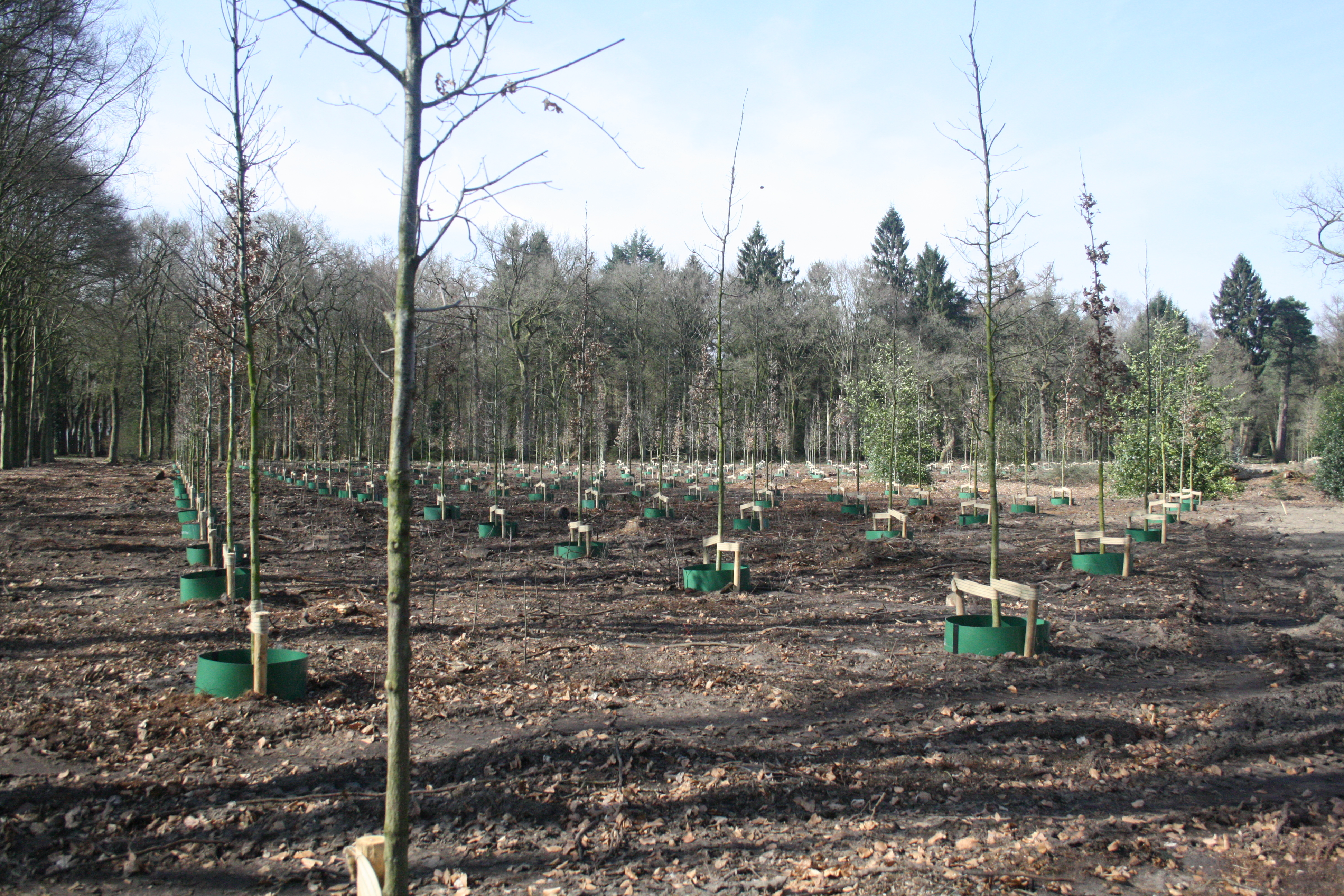 In oost-west richting